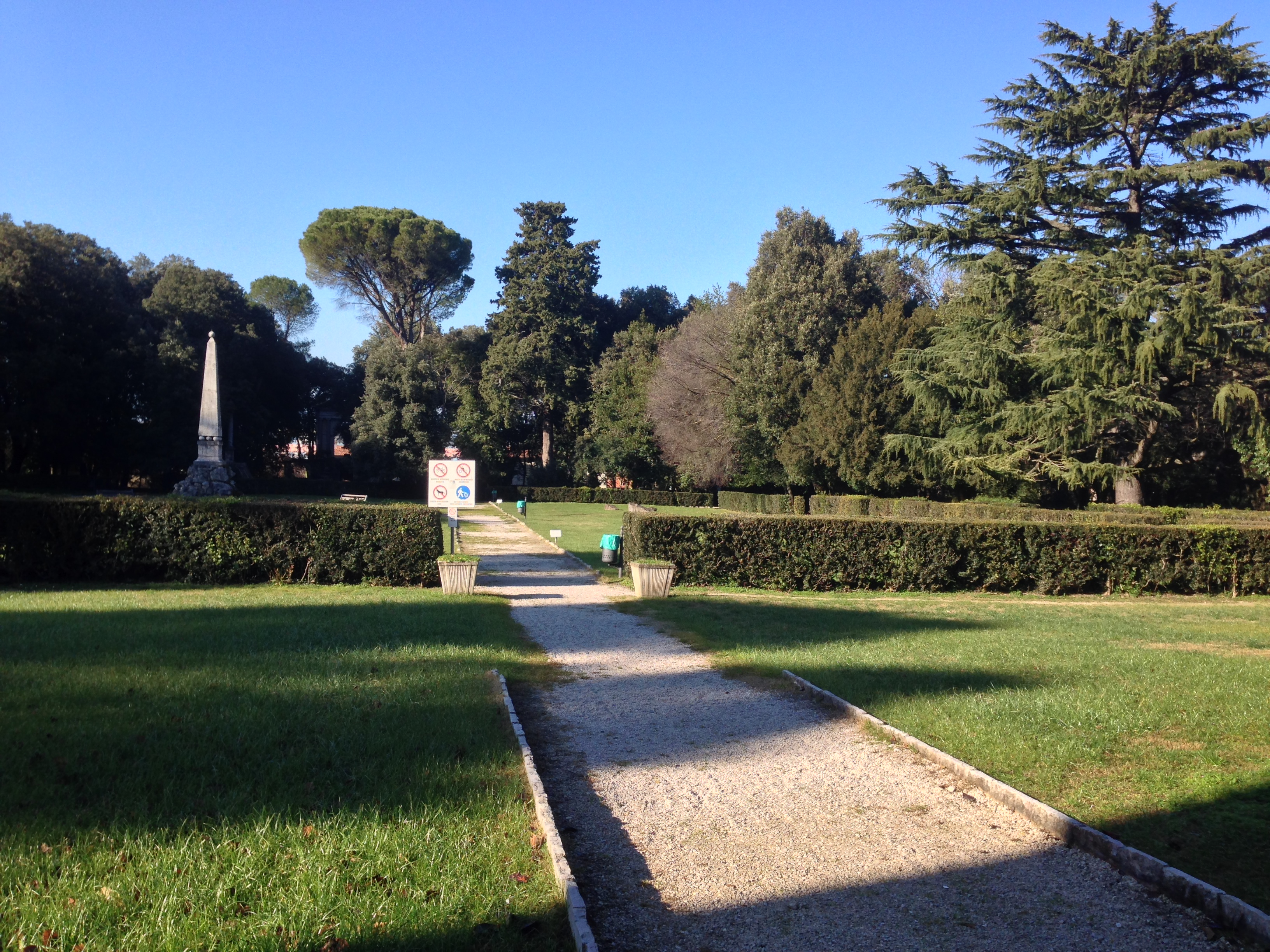 Villa redenta. Parco antistante. Spoletom